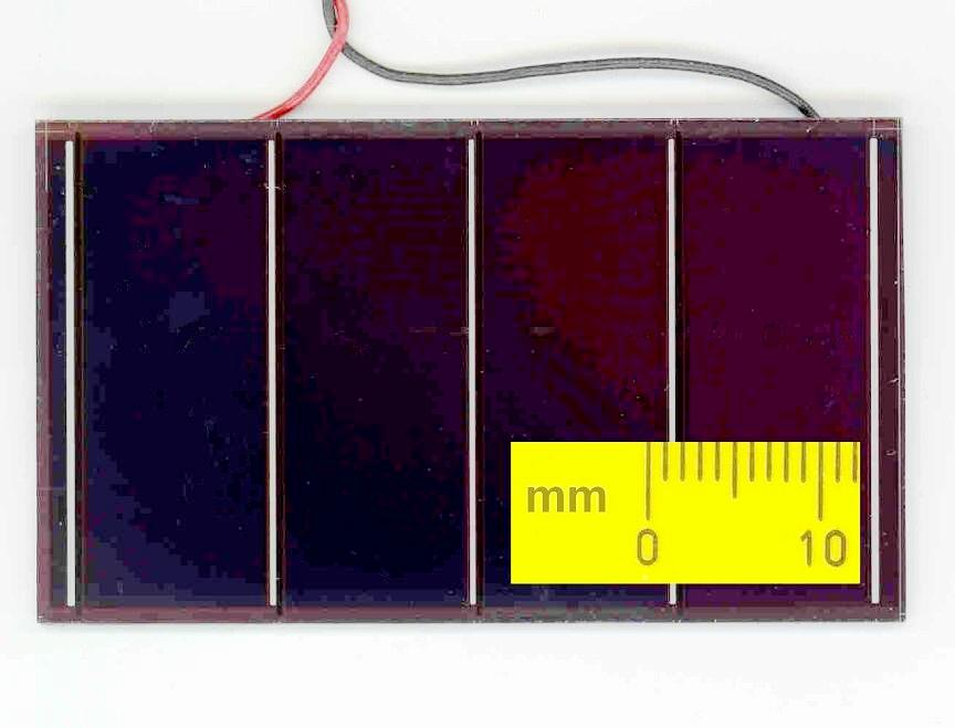 Amorphe Dünnschicht-Solarzelle; andere Versionen: solarz1.JPG